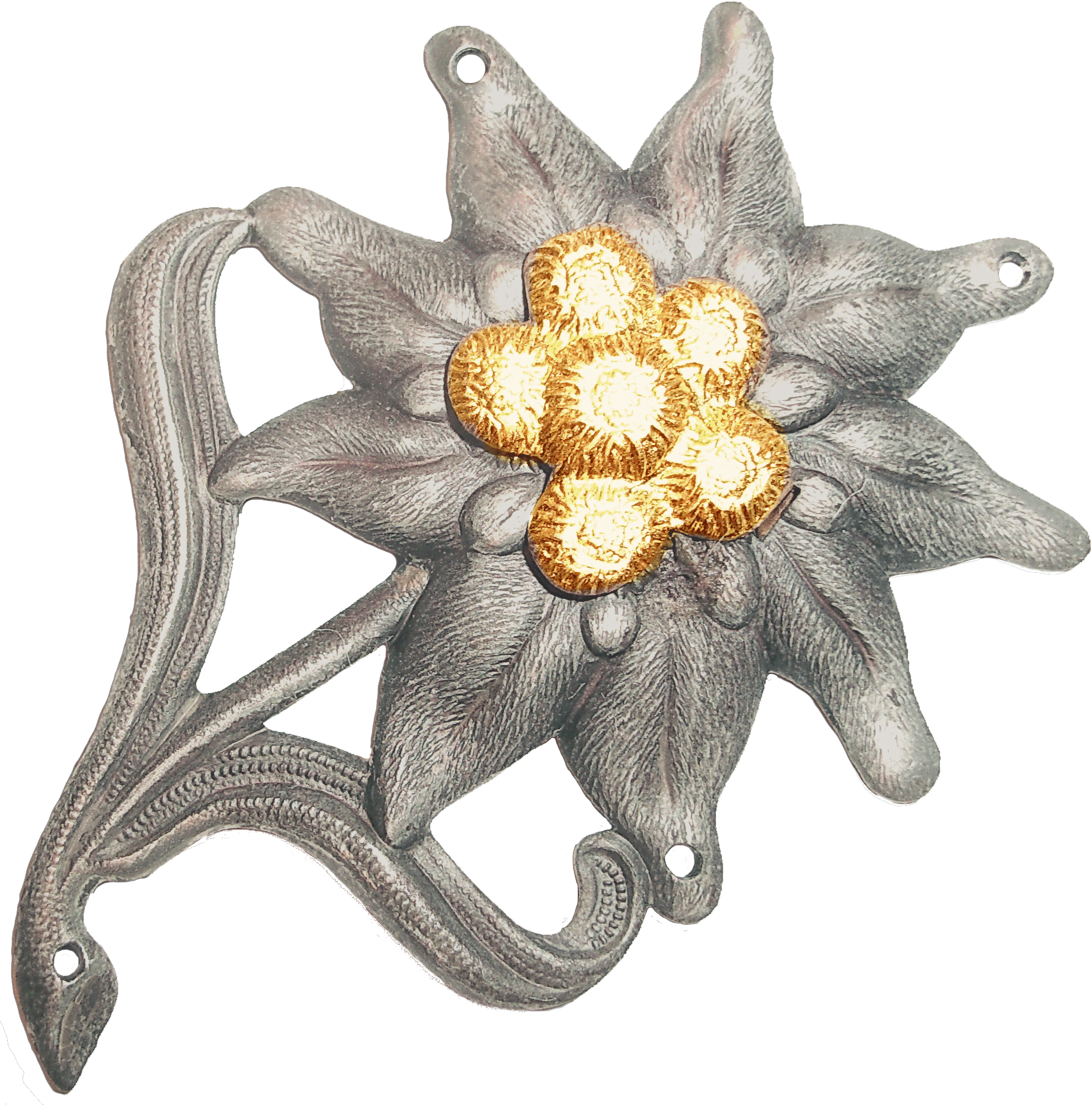 Ergänzungszeichen zum Barettabzeichen der Gebirgstruppe der Bundeswehr Barettfarbe: Ergänzung zum Barett / Bergmütze Maße: Hoch: 40mm Breit: 52mm (Staubgefäße Durchmeser: 14mm) Ausführung: altsilber (goldfarbene Staubgefäße), Metall